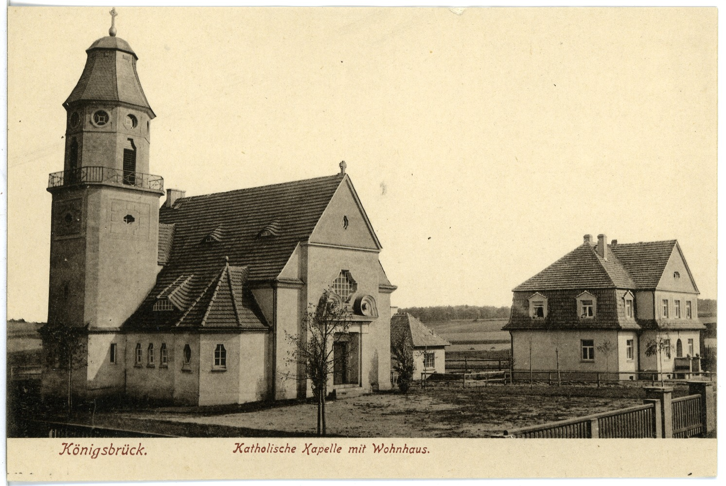 Königsbrück; Katholische Kapelle mit Wohnhaus This postcard is from publisher Brück & Sohn in Meißen ( postcard has a unique number 19467 and is available in a higher resolution at the publisher. This images was uploaded in a cooperation project between Wikipedians and the publisher.